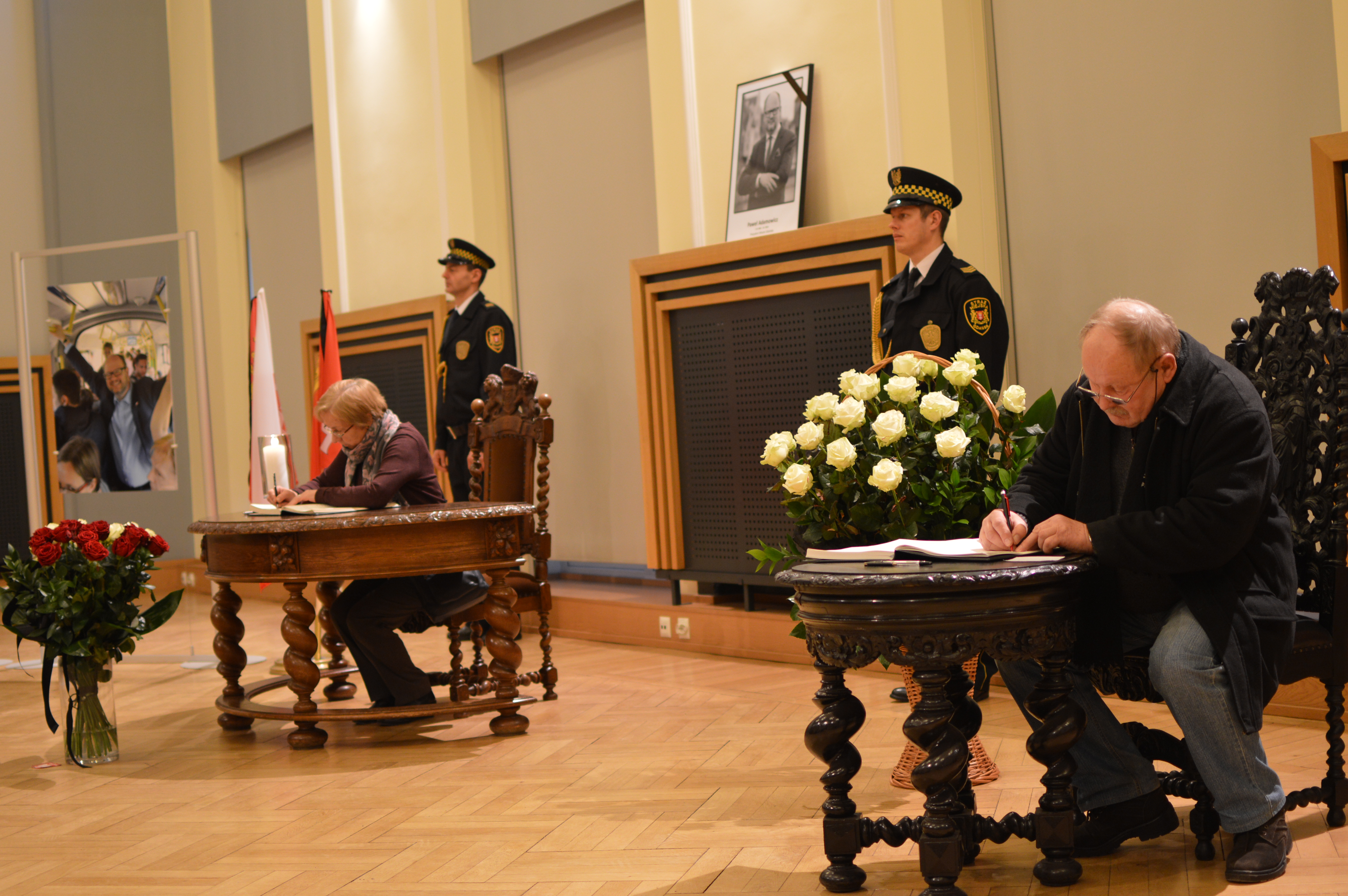 Urząd Miasta w Gdańsku, 15 stycznia 2019 - gdańszczanie podpisujący księgi kondolencyjne